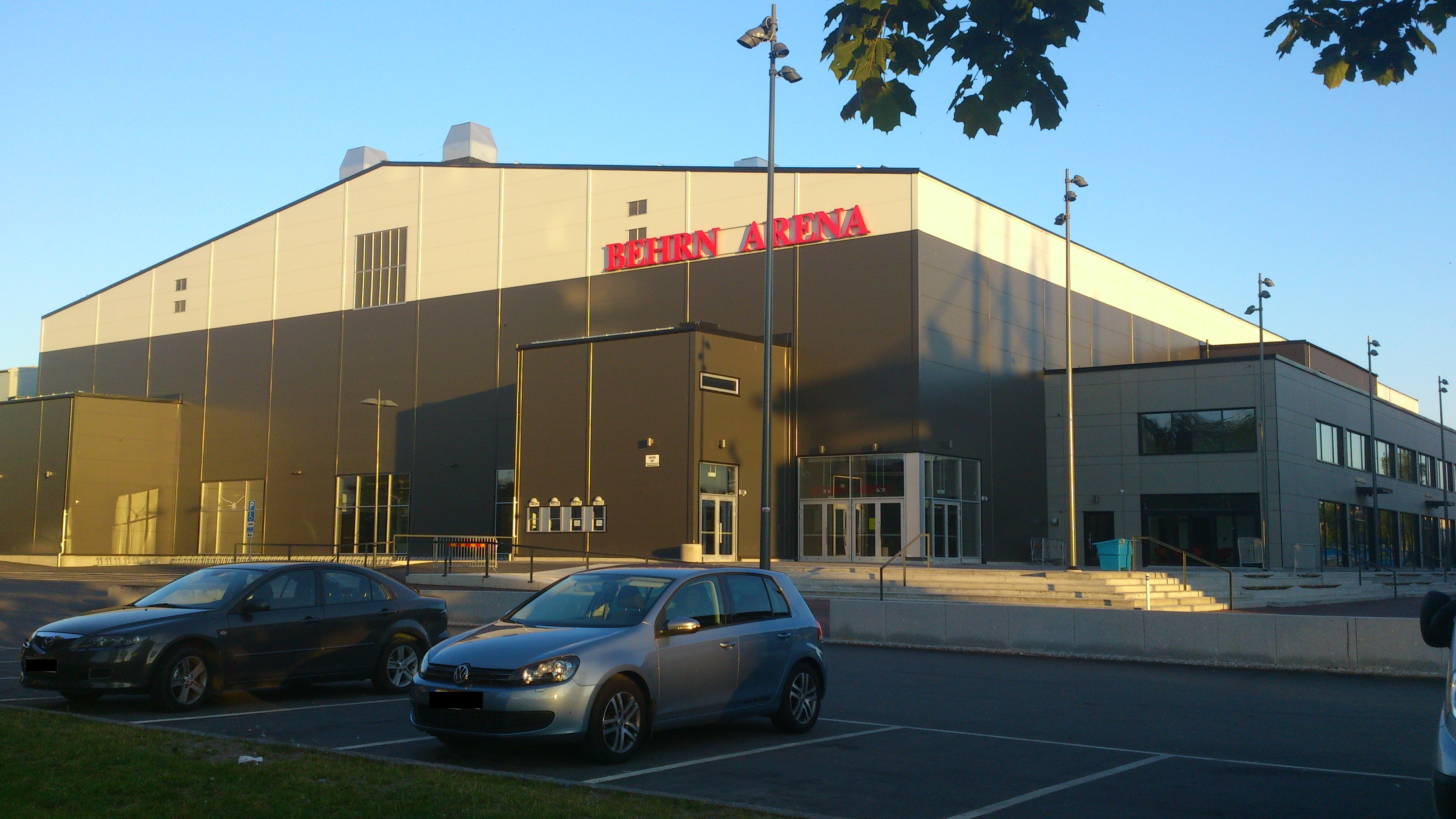 Ishallen, vilken är en del av arenakomplexet Behrn Arena i Örebro